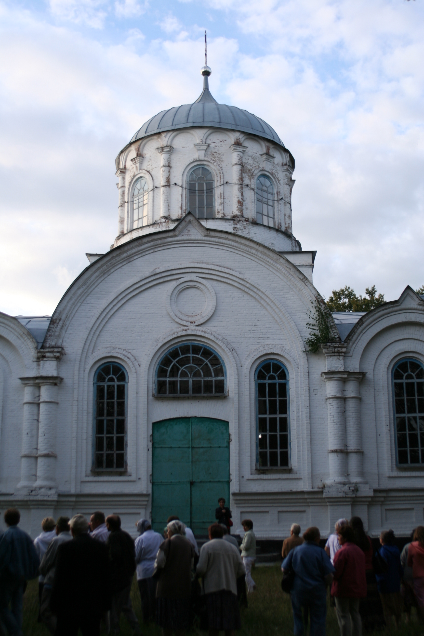 Михайлівська церква у Комарівці Борзнянського р-ну Чернігівської обл.